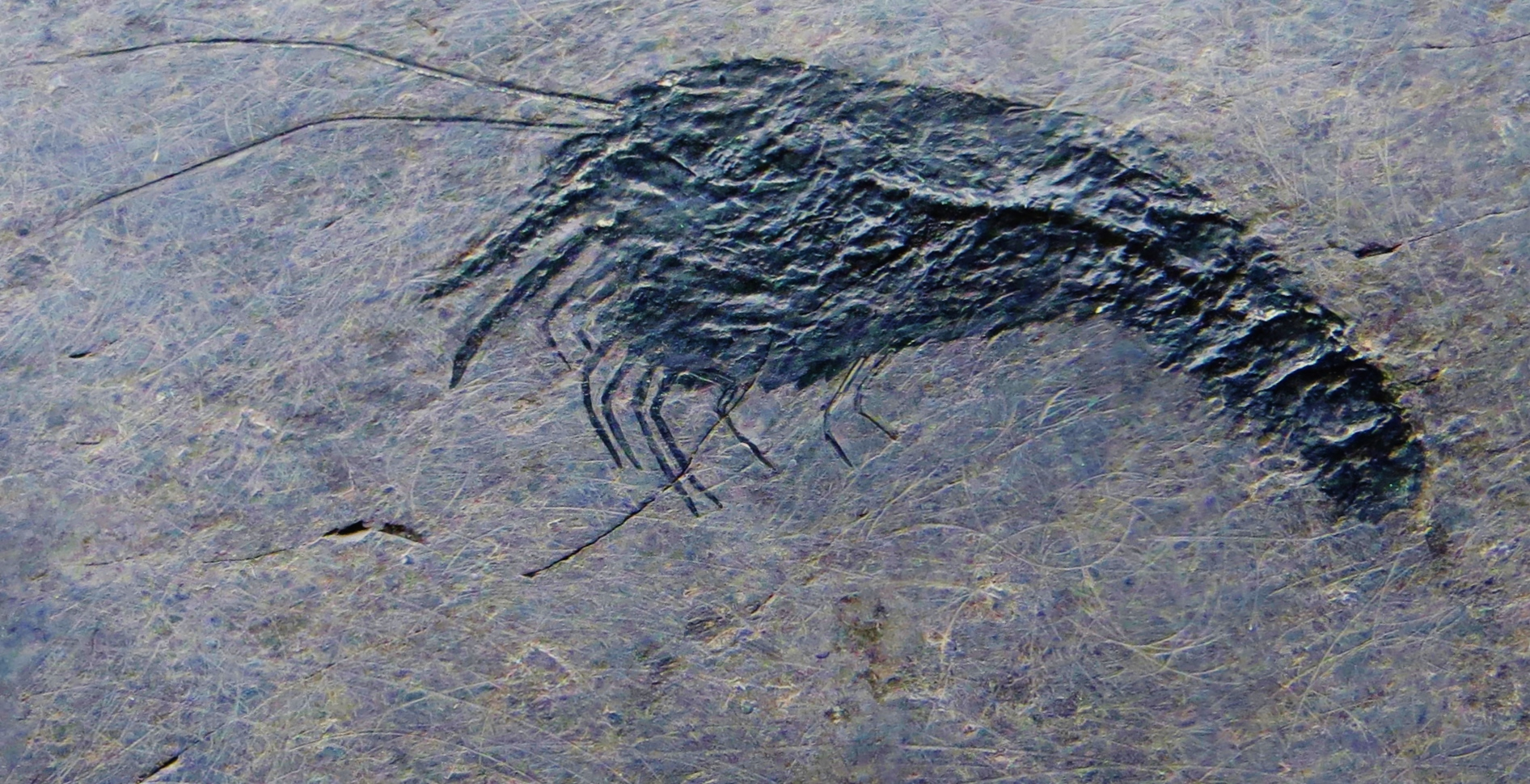 Fossil of Antrimpos, an extinct shrimp- Took the picture at Museo di Storia naturale “Antonio Stoppani” - Venegono Inferiore